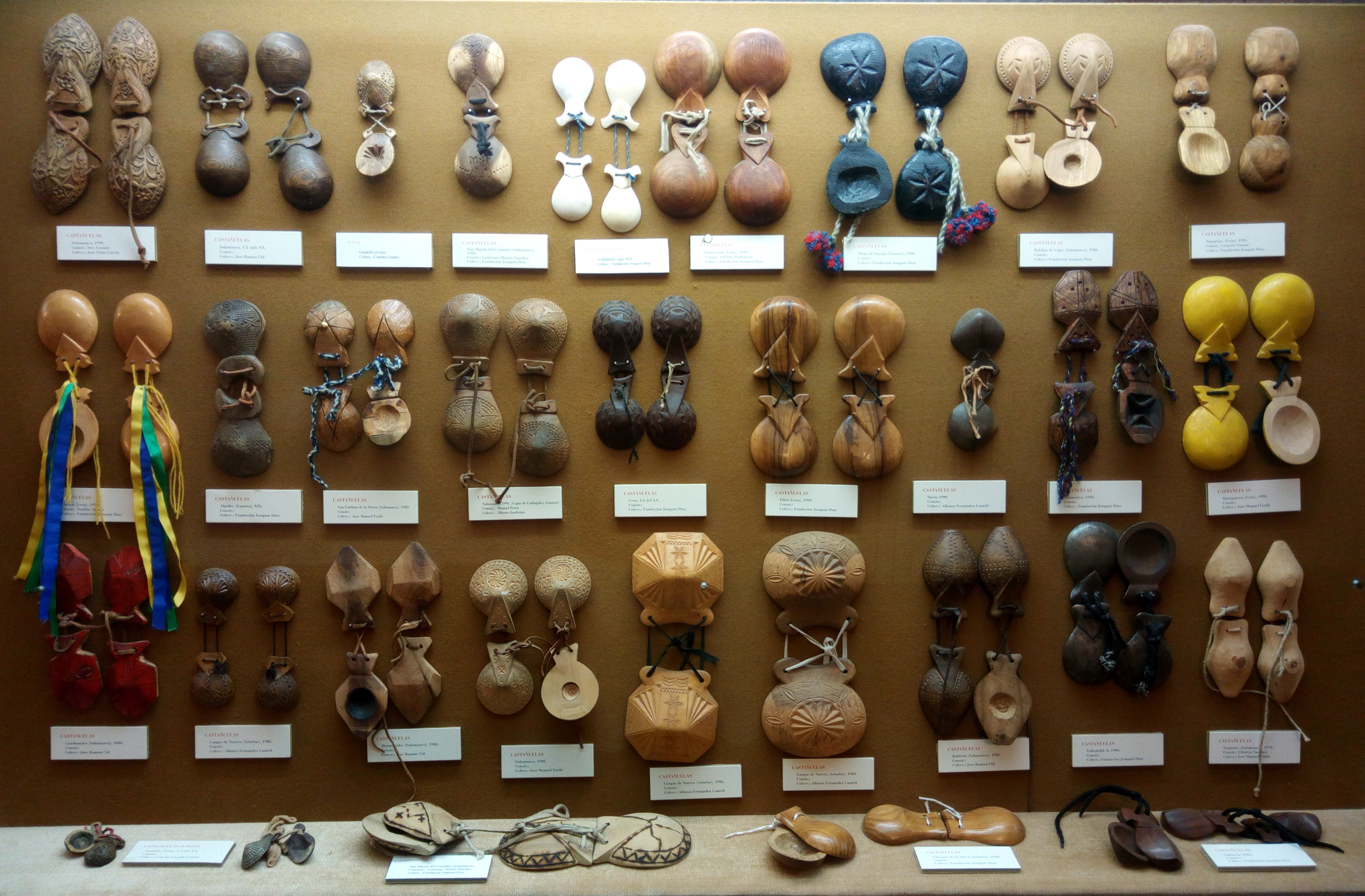 Un expositor con diversas castañuelas, en la Fundación Joaquín Díaz.